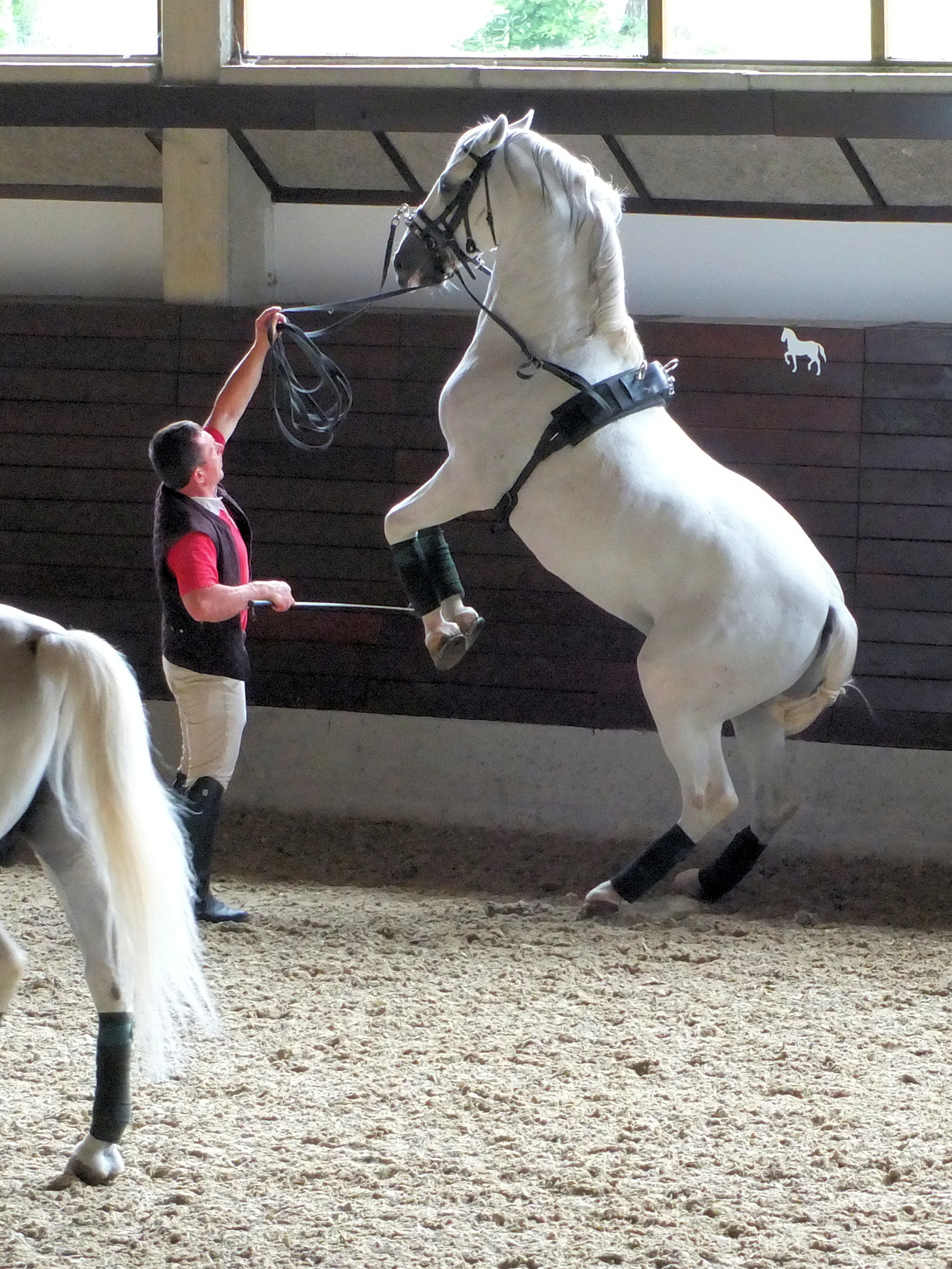 Lipica Stud Farm, Slovenia, June 2012